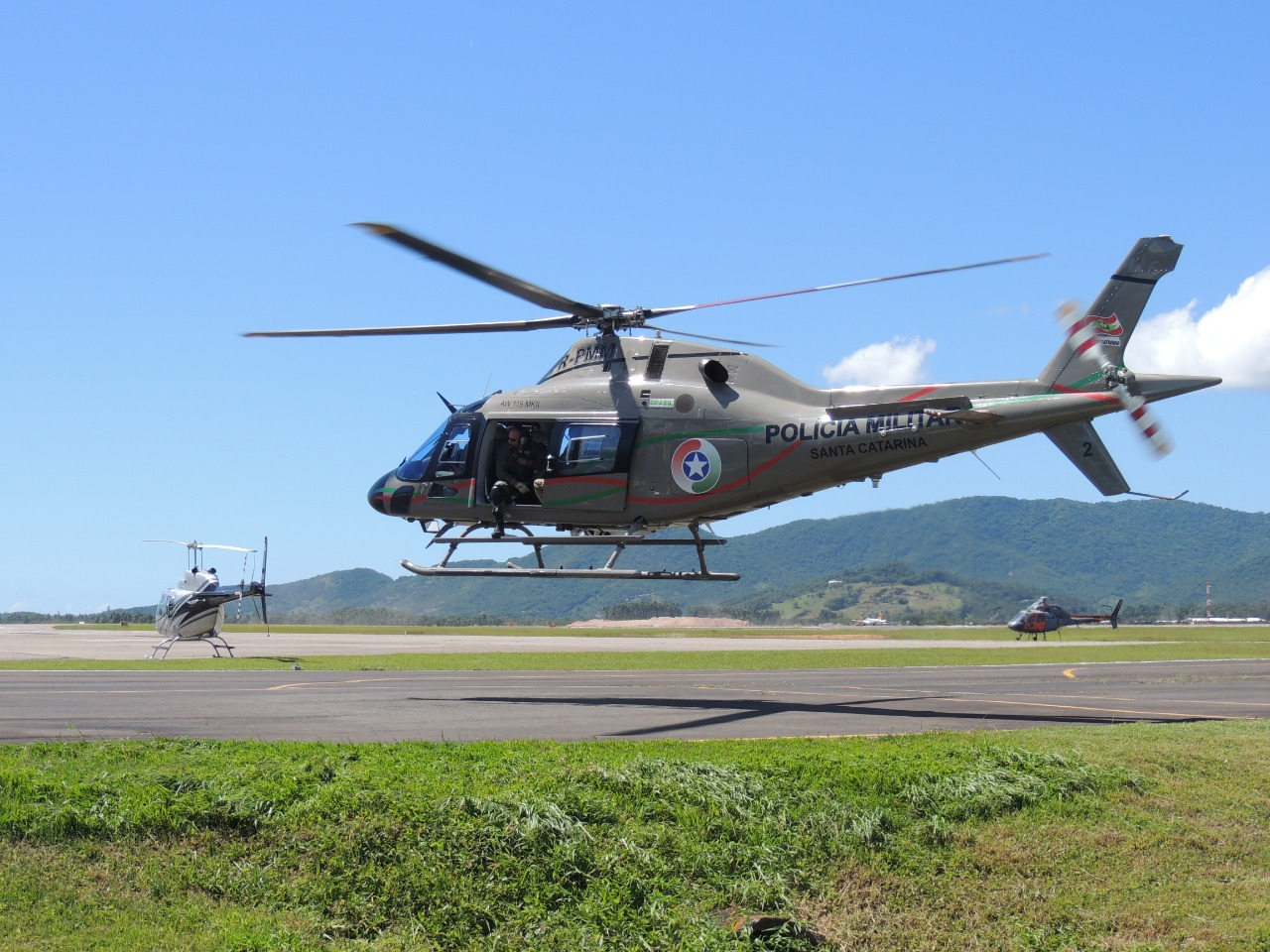 Foto oficial PMSC